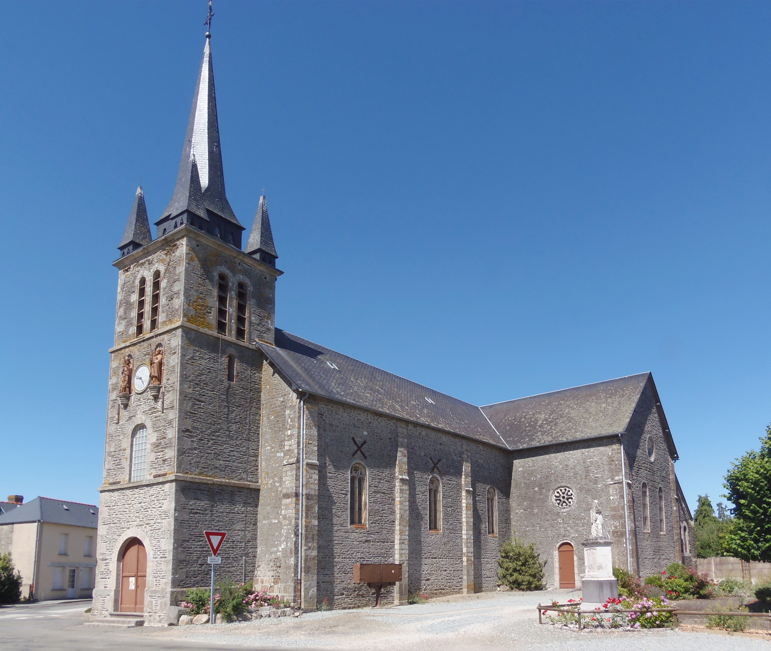 Saint-Aignan-de-Couptrain (Pays de la Loire, France). L'église Saint-Aignan.